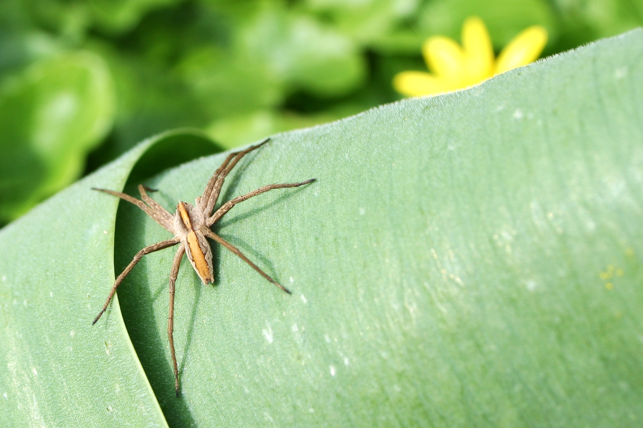 Listspinne (Pisaura mirabilis) auf einem Tulpenblatt.